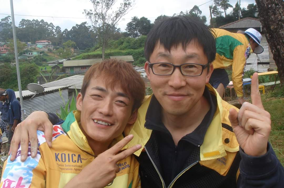 한민관, 이건